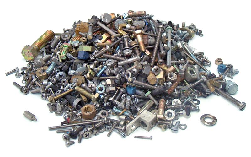 1 kg Schrauben